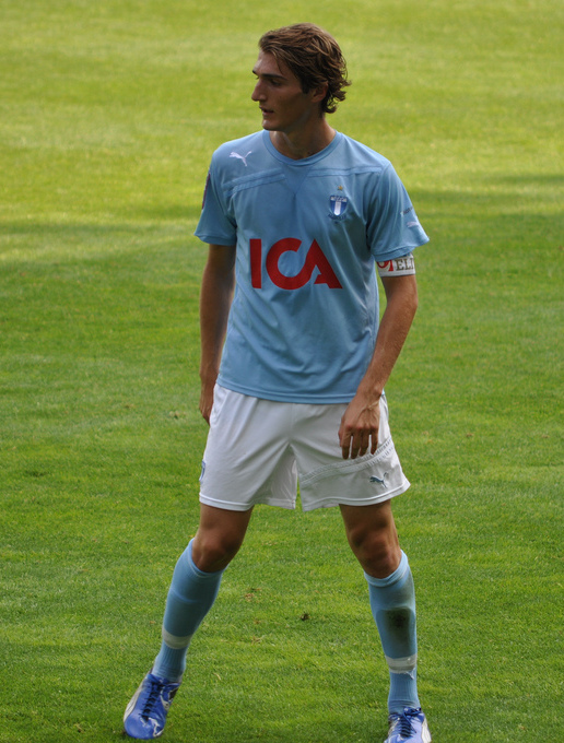 Dardan Rexhepi from MFF - Norrköping 2-1 3 Juli 2011